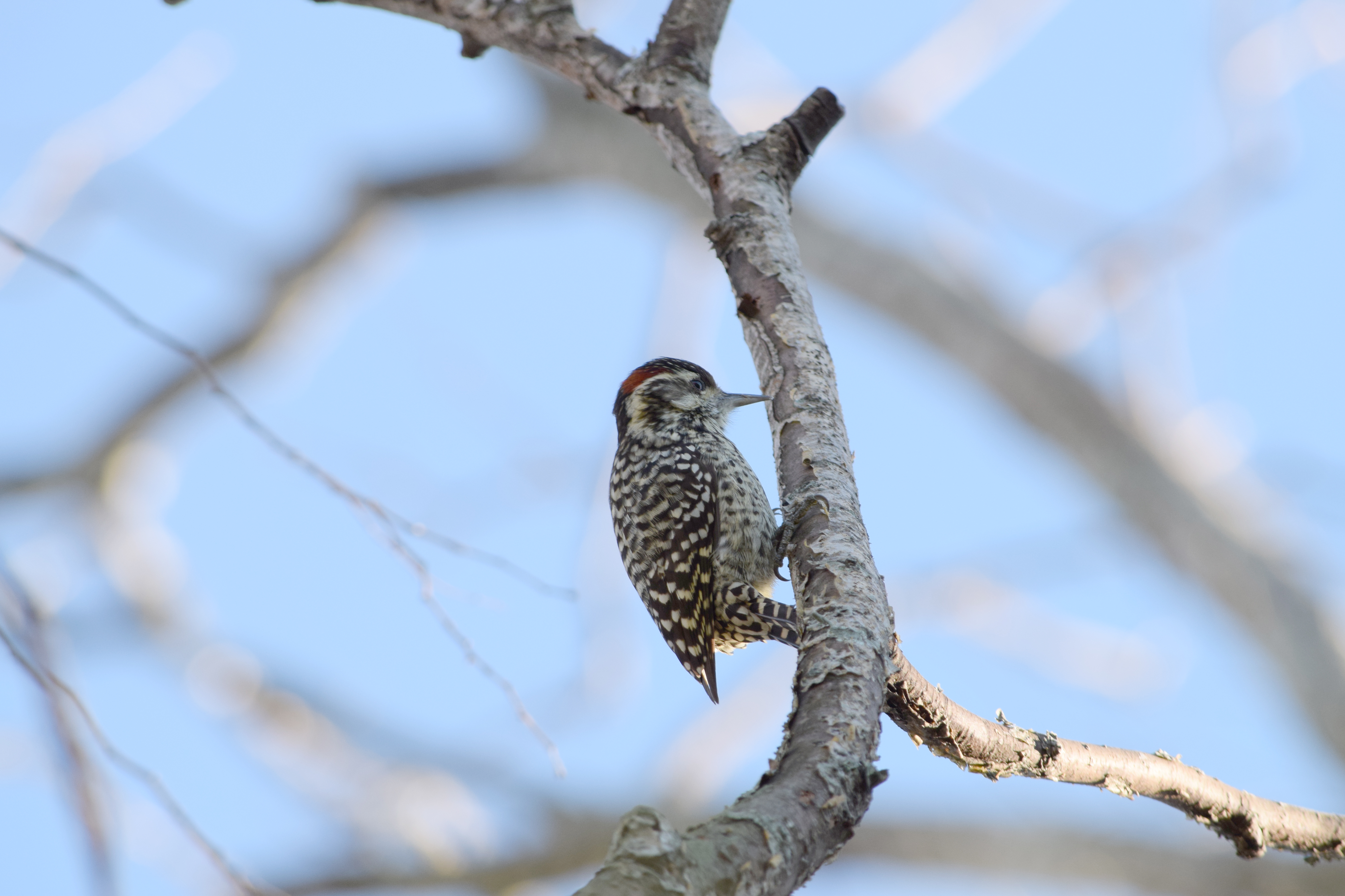 Pájaro carpintero Veniliornis mixtus en la reserva ecológica de San Isidro, Buenos Aires, Argentina